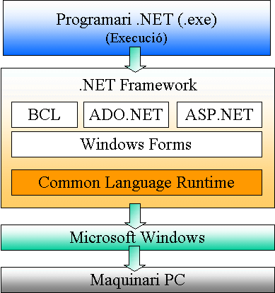 Esquema del .NET Framework